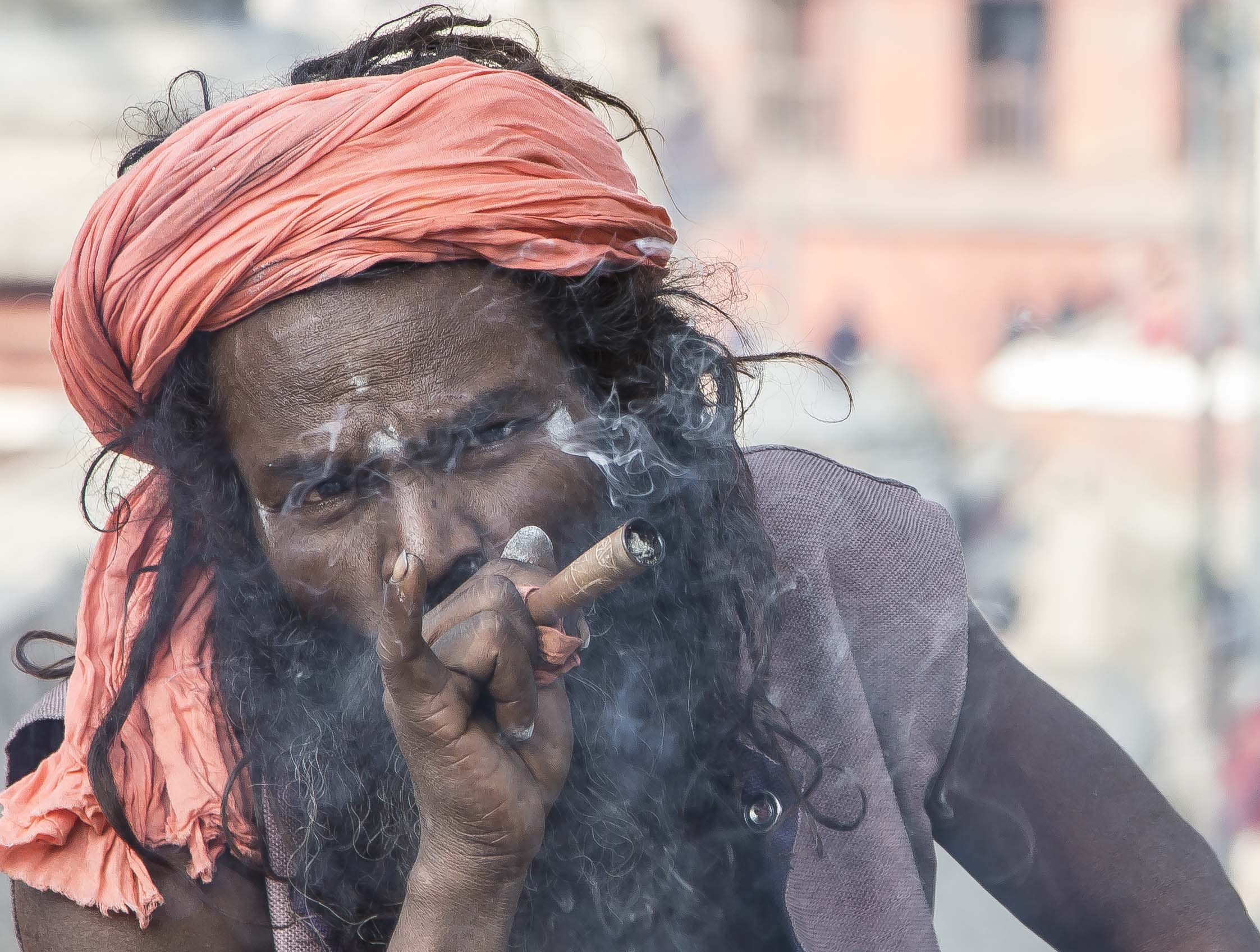 Rauchender Sadhu beim Shiva Ratri Festival in Pashupatinath, Nepal. Er gehört nicht zu den „Touri Sadhus“, die sich gegen ein (geringes) Honorar ablichten lassen. Er ist meist als Wandermönch in den Bergen unterwegs. Der Joint ist bei den Sadhus geduldet; erlaubt ist er in Nepal nicht mehr.